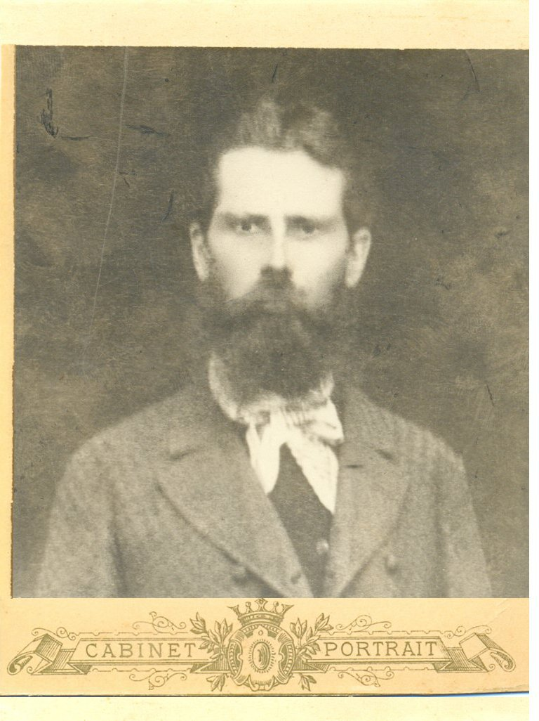 На фотокарточке дворянин и чиновник Можейко-Корженевский Игнатий Станиславович.